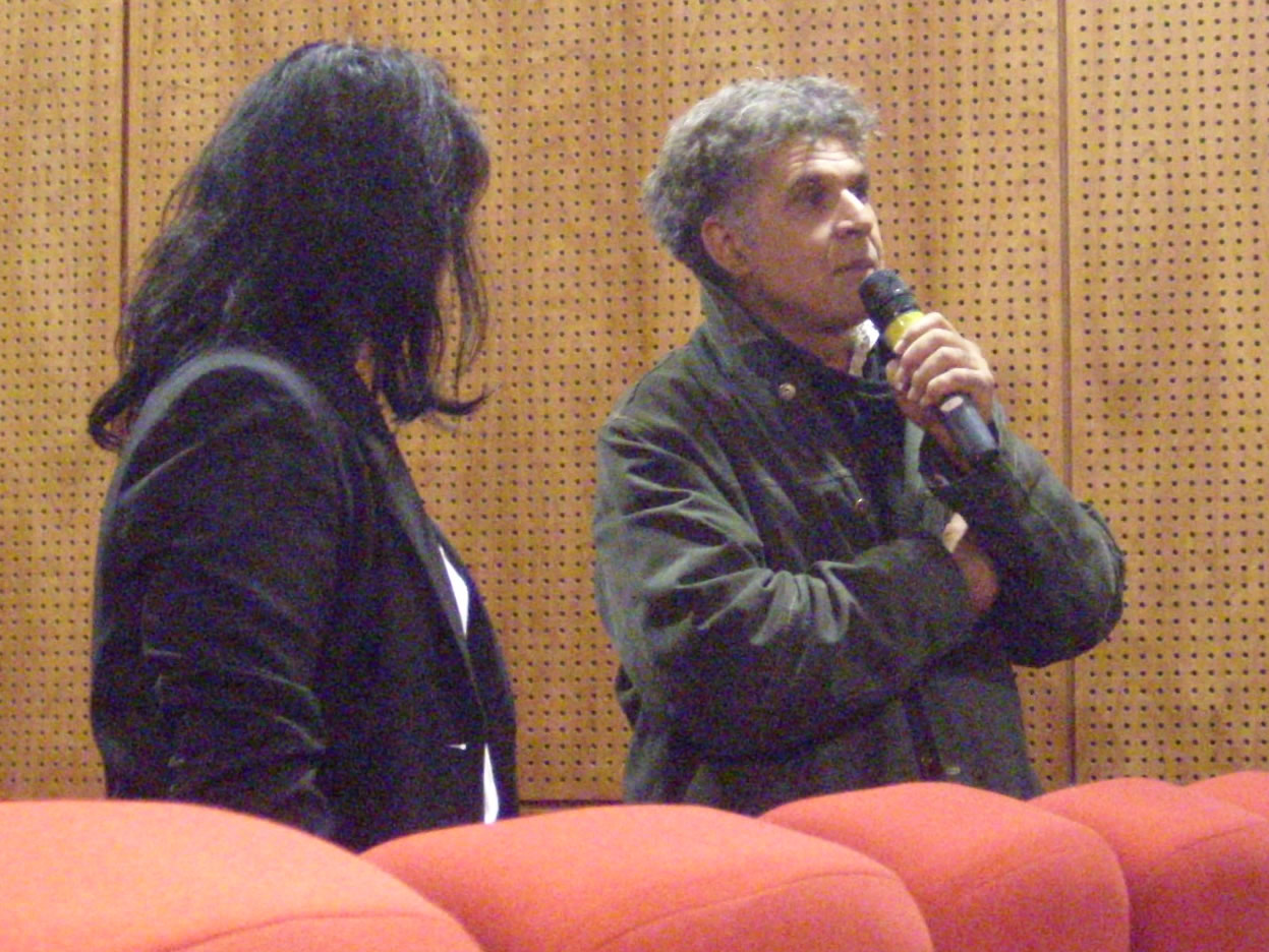 Amor Hakkar, présentant La Maison jaune au ciné Saint-Leu d'Amiens